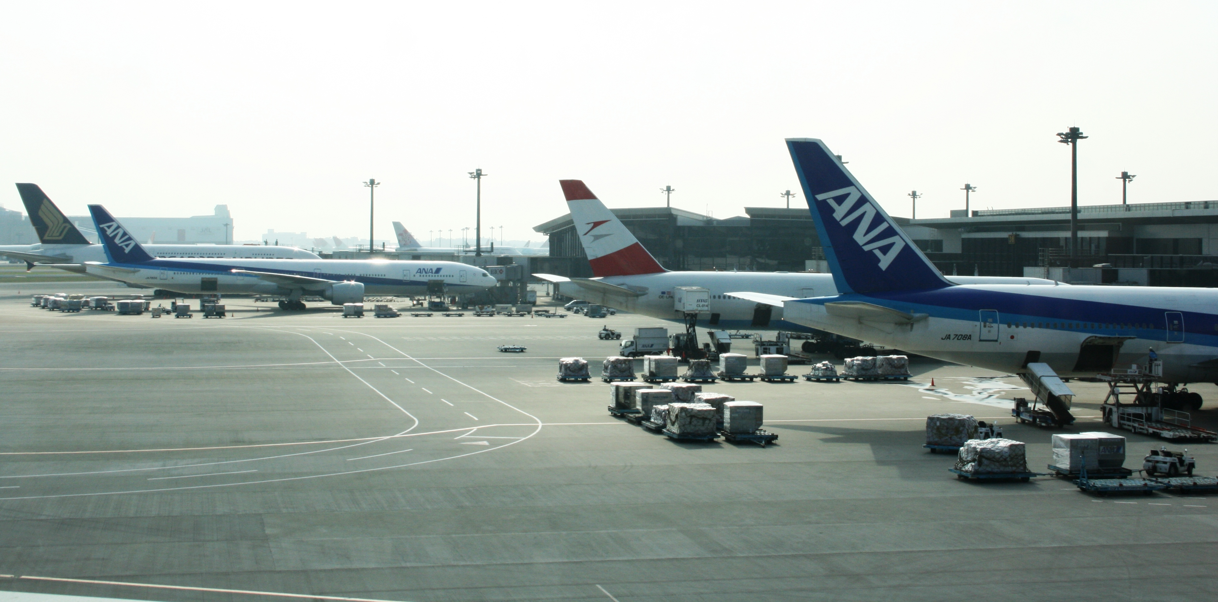 Avions à l'aéroport international de Narita.